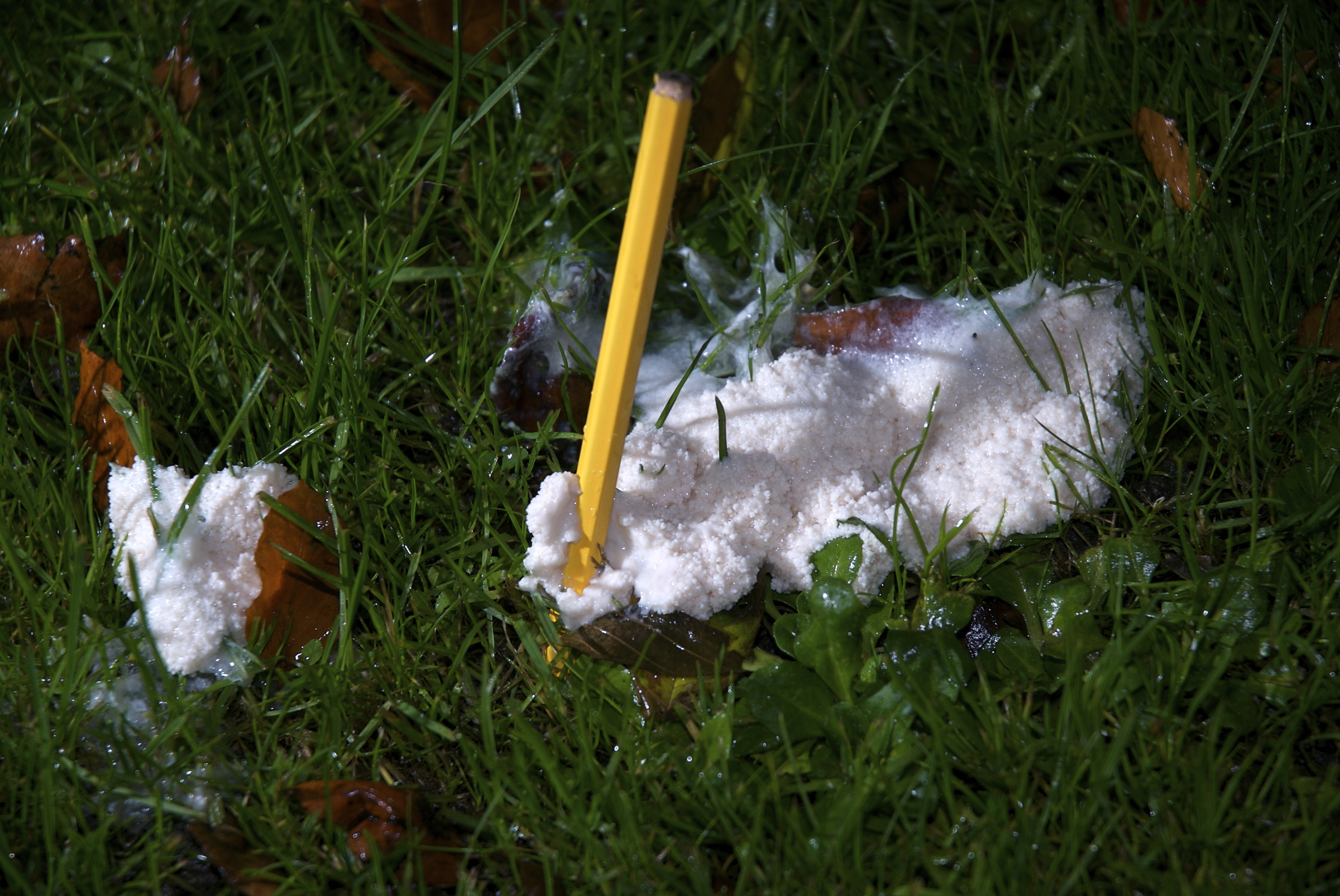 Mycetozoa Protozo